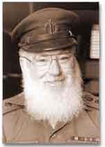 חיים מנחם בקשט